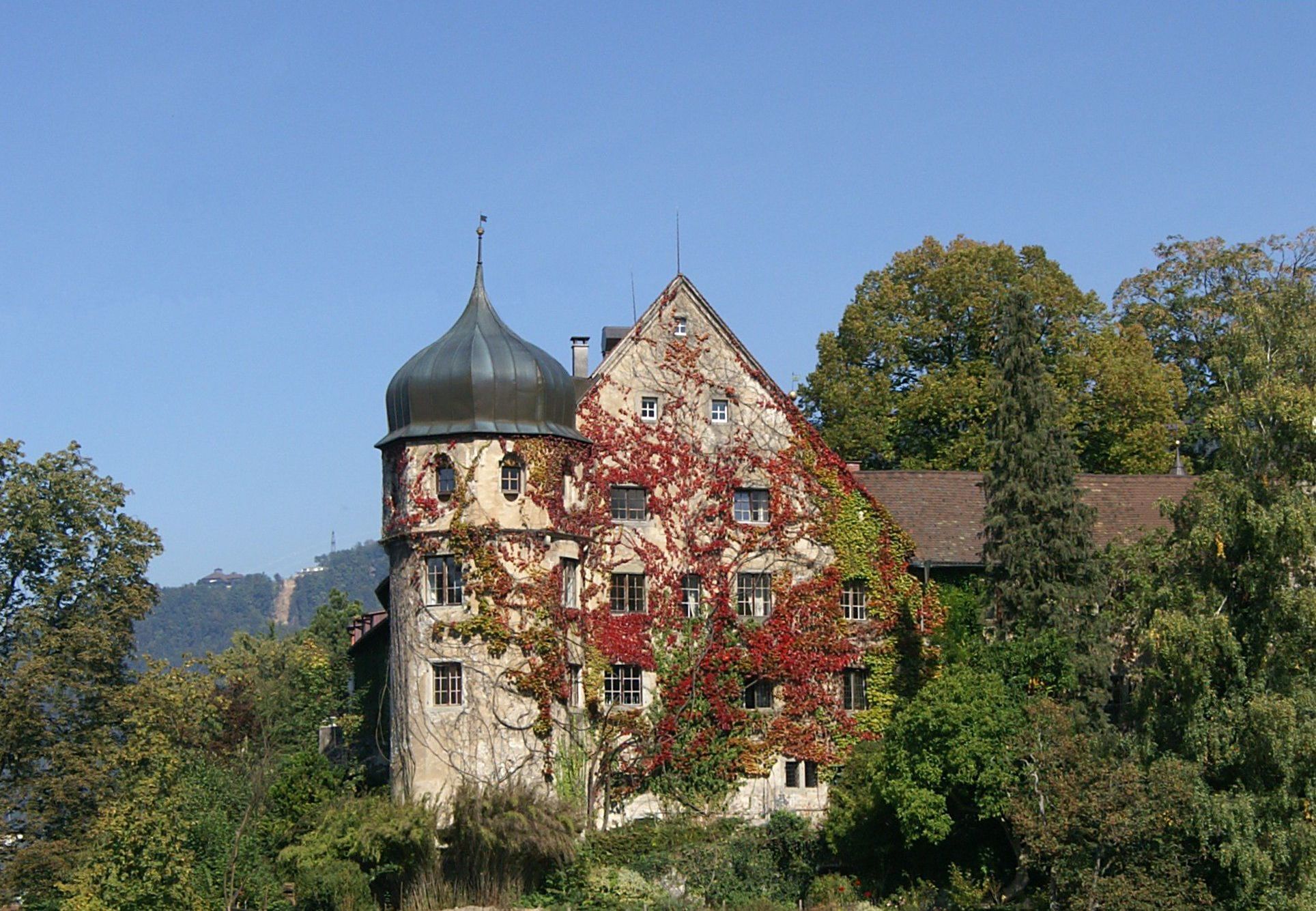 Gourmet Hotel Deuring Schlössle in der Oberstadt von Bregenz.